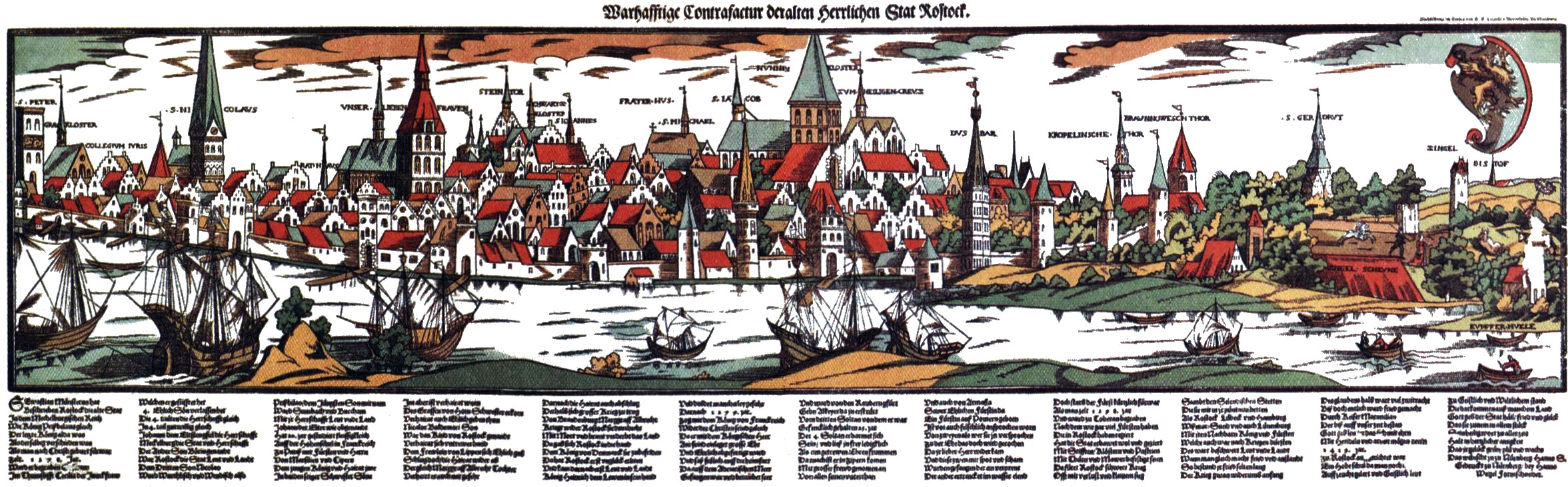 Holzschnitt der Rostocker Ansicht von Norden mit Versen von Hans Sachs